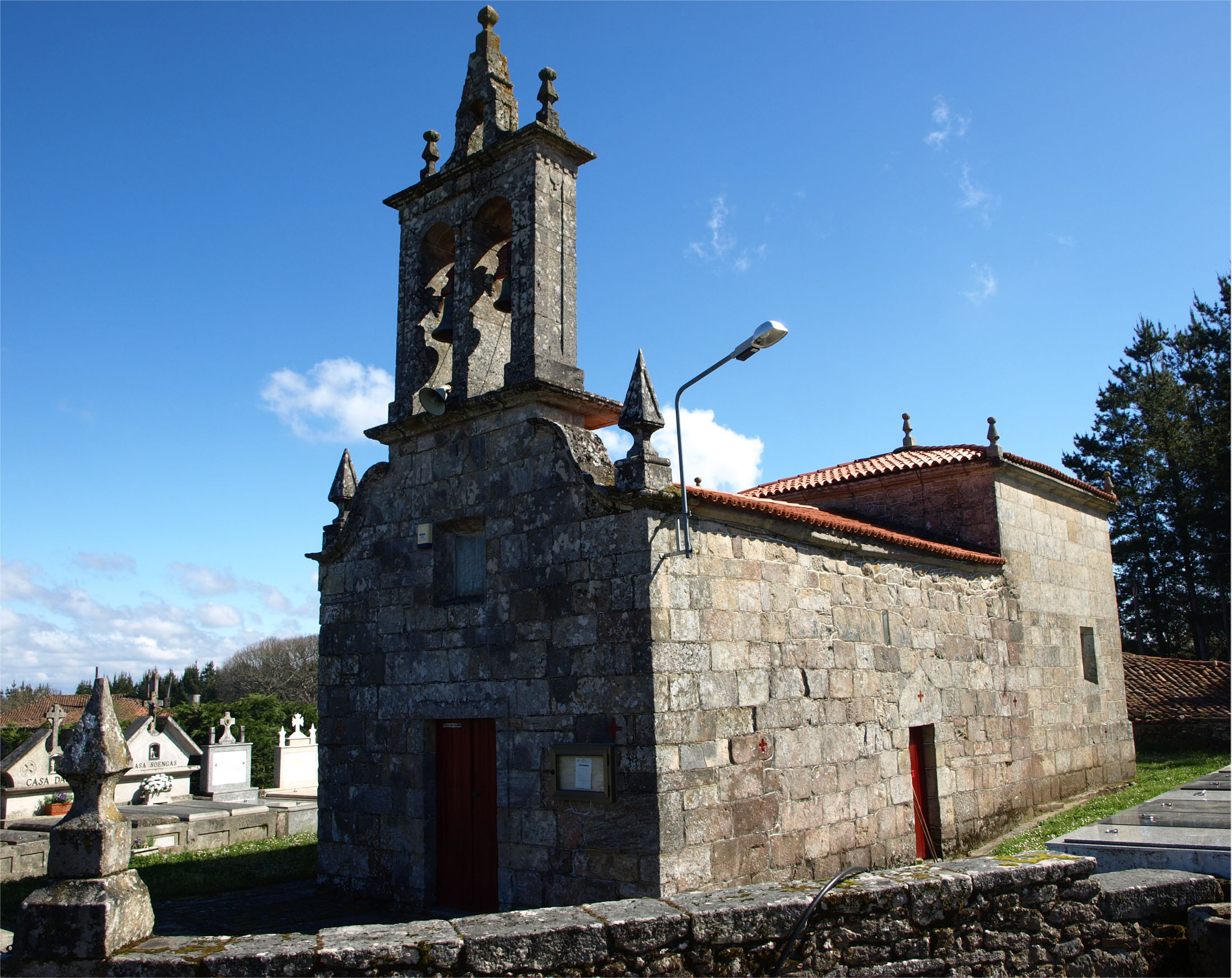 Igrexa de San Xurxo de Terrachá (Antas de Ulla)